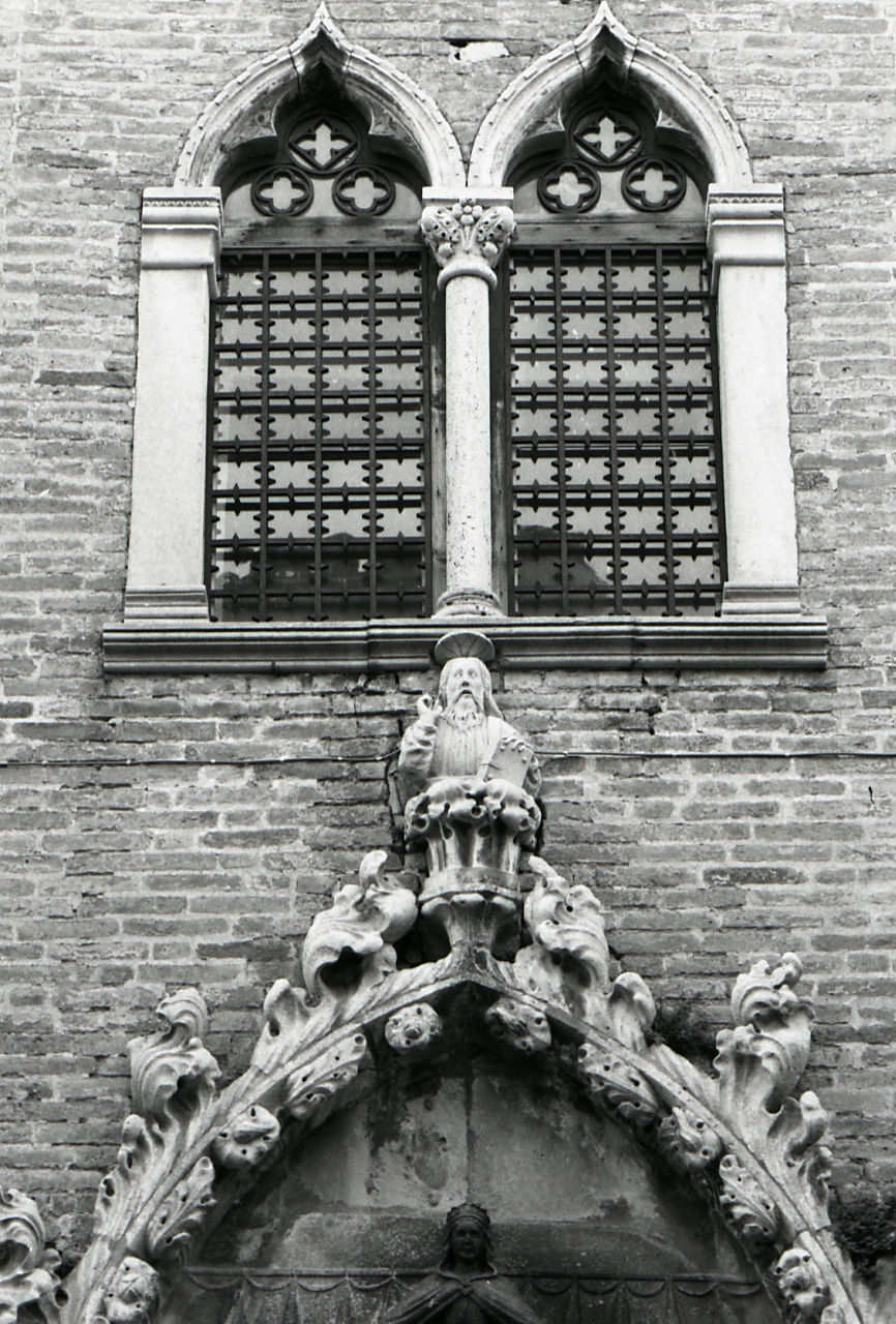 Fermo, Portale dell'ex chiesa della Carità poi Monte di Pietà. Servizio fotografico : Fermo, 1969 / Paolo Monti. - Strisce: 7, Fotogrammi complessivi: 34 : Negativo b/n, gelatina bromuro d'argento/ pellicola ; 35 mm. - ((I fotogrammi hanno una doppia numerazione. s. - Sul portanegativi: Nikon FP4. - Sul dorso del portanegativi Monti specifica: "Marche. Pietre. Selciato". - Occasione: Documentazione per la pubblicazione: "TOURING CLUB ITALIANO, Marche, Milano, TCI, 1971". - Fonte: Agenda di Paolo Monti: Monti/ 3 aprile 1966 - 9 marzo 1971/ 12421-16823 (1966-1971), presso Archivio Paolo Monti. - Fonte: Monografia: TOURING CLUB ITALIANO, Marche, Milano, TCI, 1971 (1971). - Fonte: Agenda di Paolo Monti: Monti - Agenda 1969 (1969), presso Archivio Paolo Monti